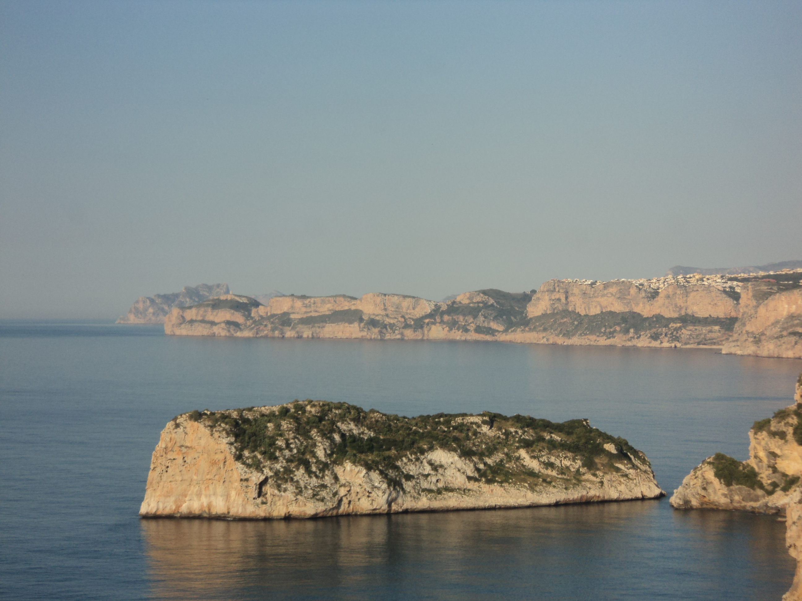 Imagen de la Isla del Descubridor en Jávea / Xàbia